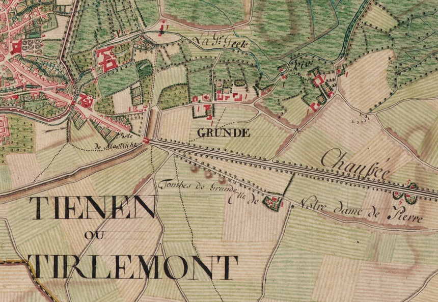 Extrait de la carte de Ferraris n° 132A